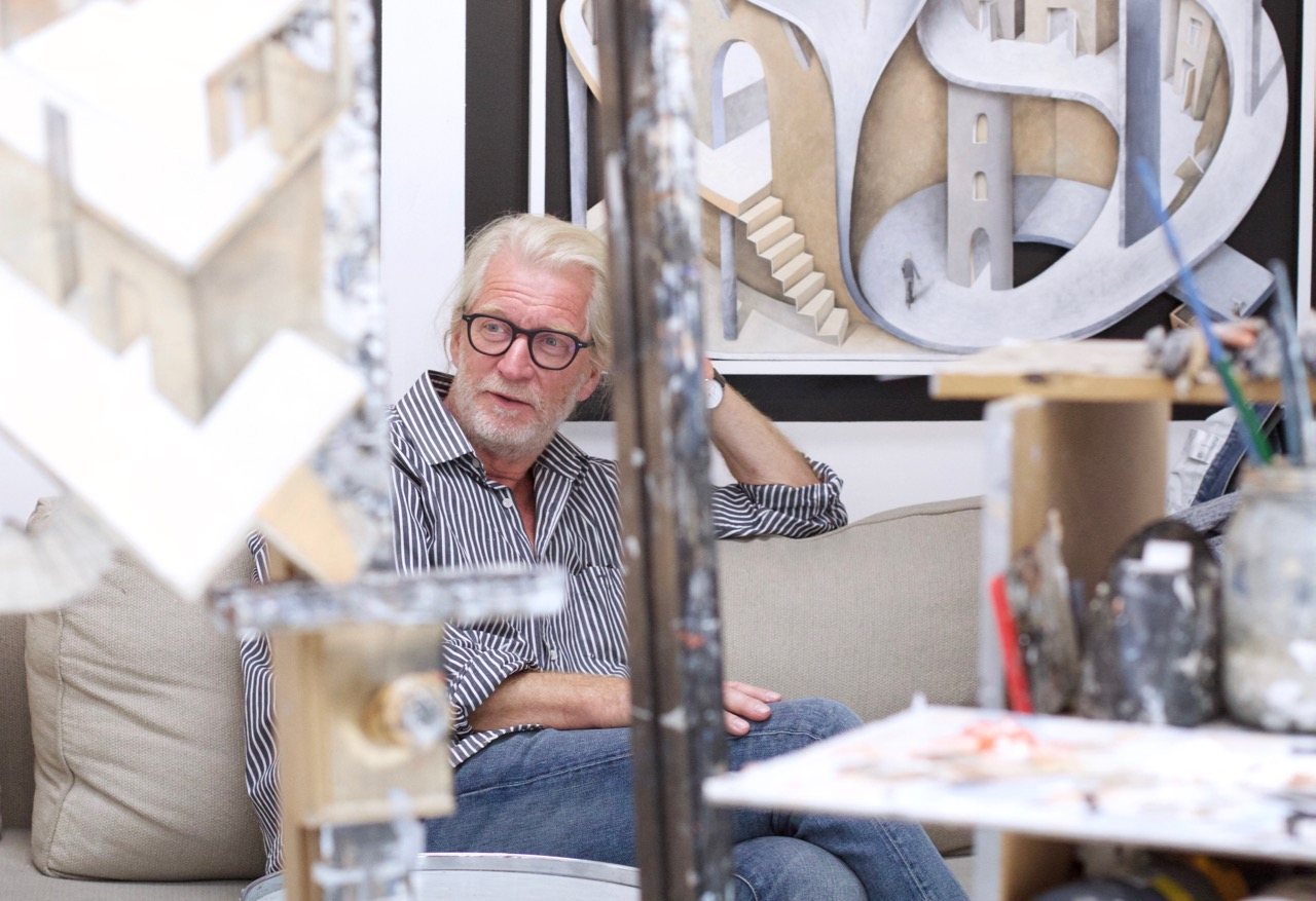 Stefan MÅS Persson i sin ateljé i Halmstad. Foto: Ida Gudmundsson.